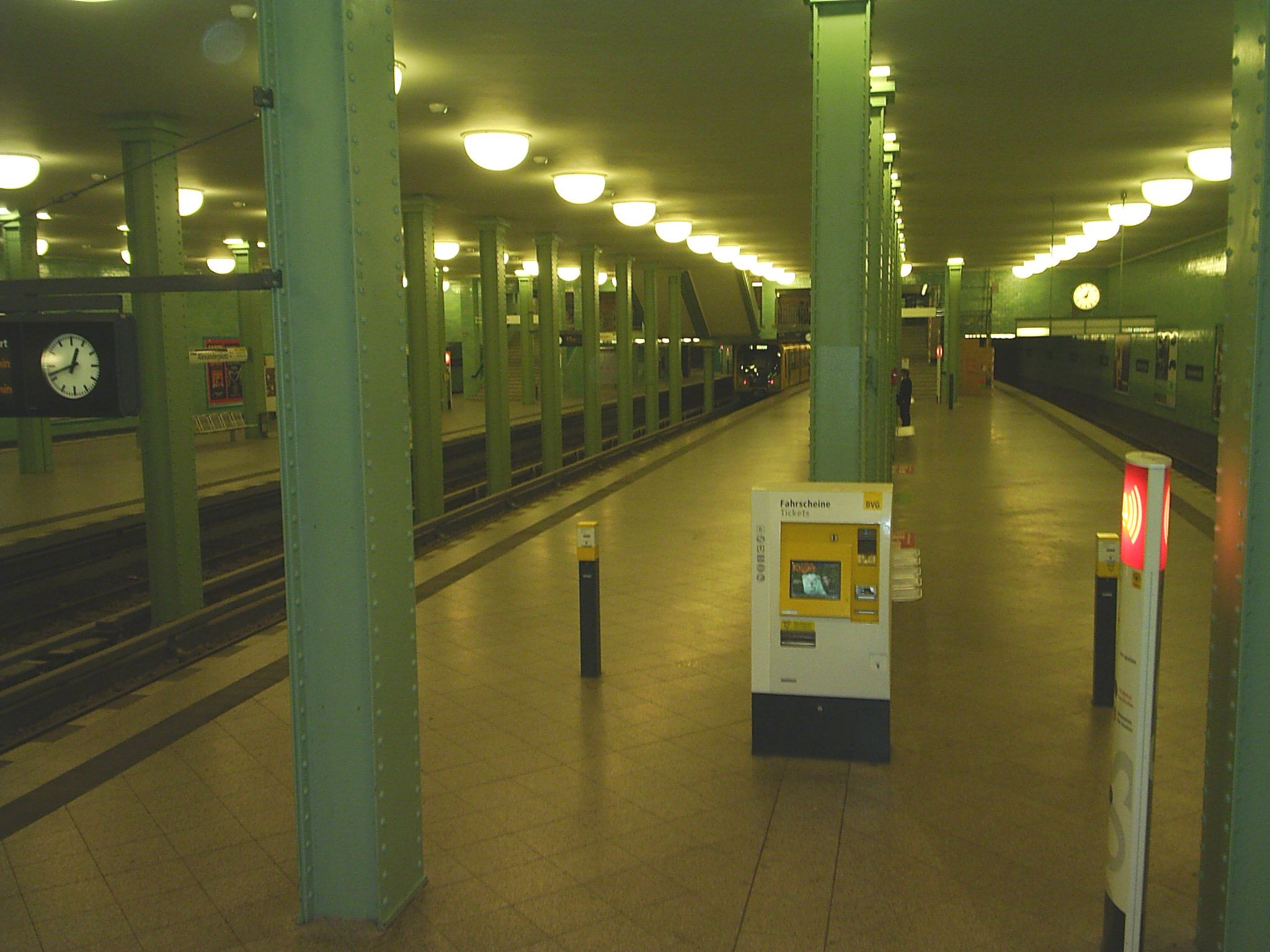 Bahnsteig der U5 am U-Bahnhof Alexanderplatz in Berlin